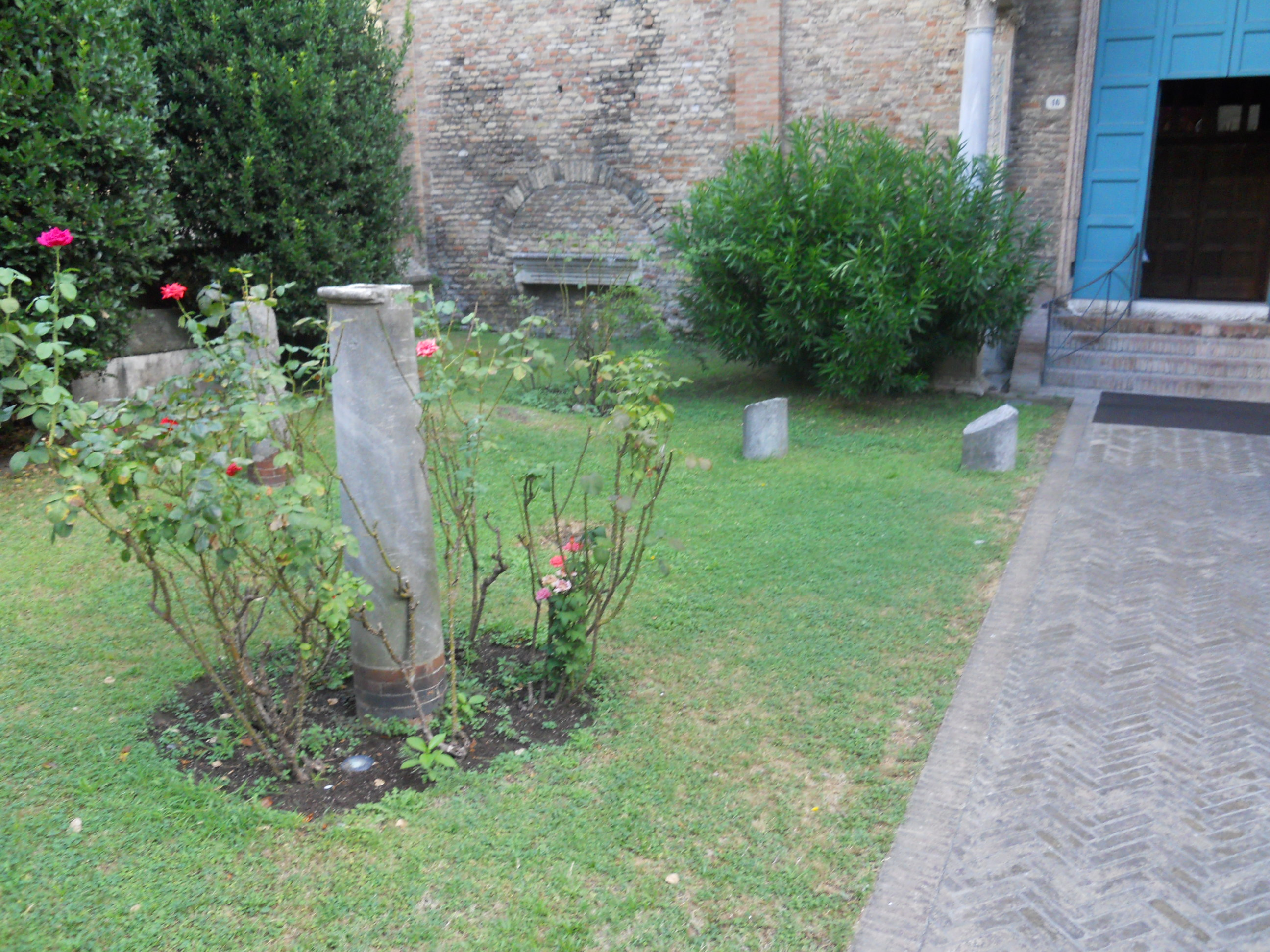 Le colonne situate nel giardino antistante la Basilica di Sant'Agata Maggiore in Ravenna.